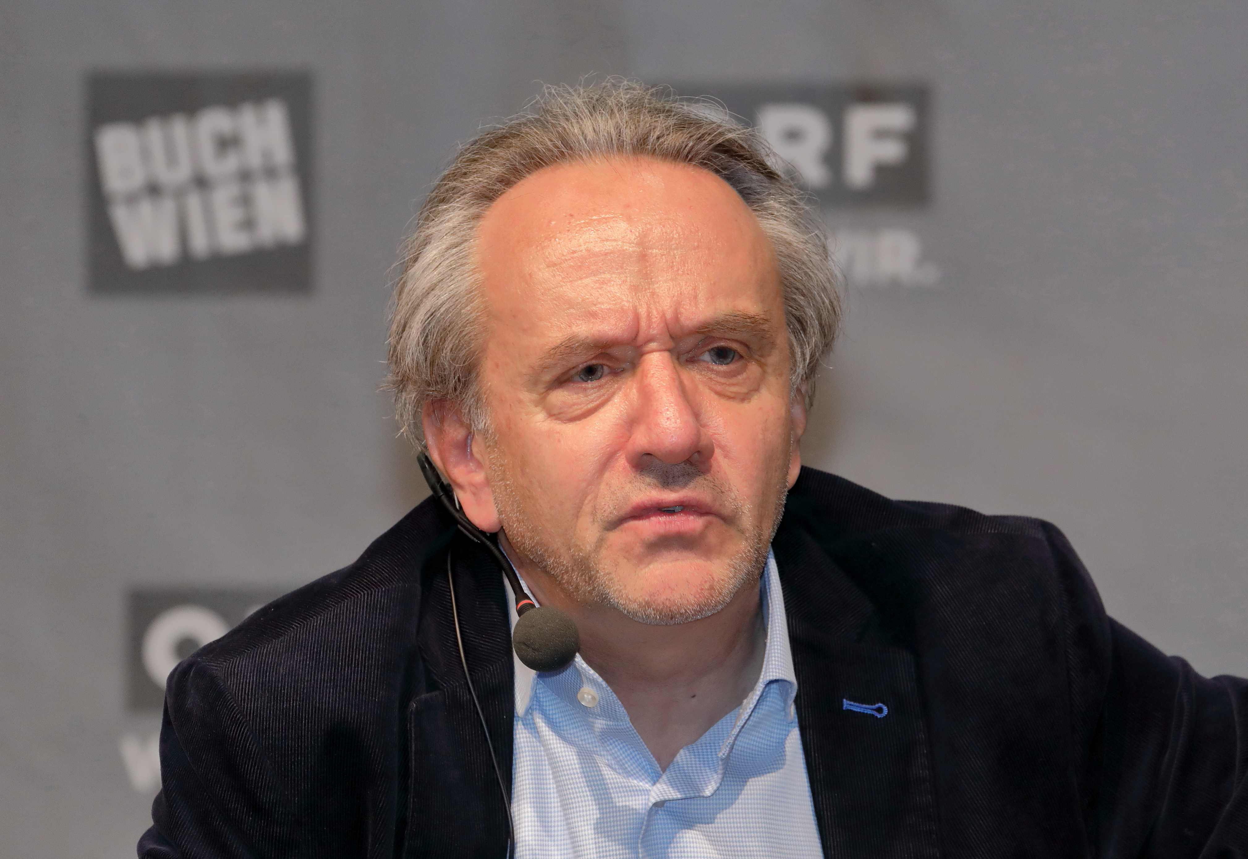 Der österreichische Kulturjournalist und Autor Heinz Sichrovsky auf der ORF-Bühne der Wiener Buchmesse 2018.